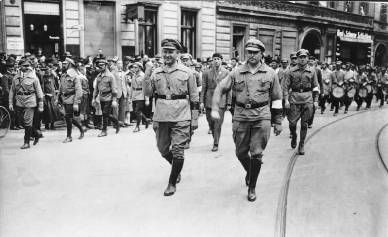 ADN-ZB/IML-ZPA 3. Reichstreffen des RFB vom 5.-6. Juni 1927 im Schiller-Park in Berlin-Wedding Ernst Thälmann (l.) und Willy Leow an der Spitze des Demonstrationszuges.